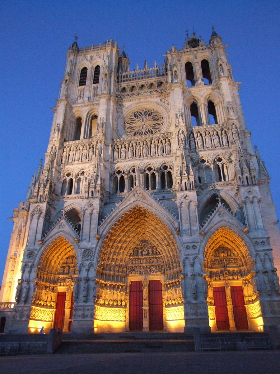 Amiens Cathedral (Cathédrale Notre-Dame d'Amiens), France